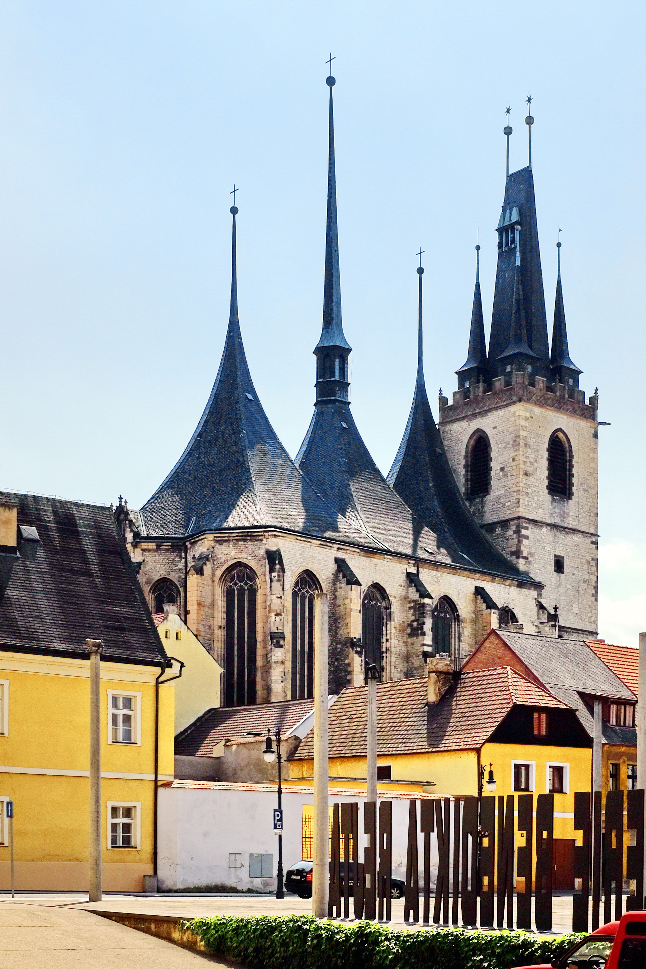 Kostel svatého Mikuláše, Beneše z Loun, parc. 1, Louny.